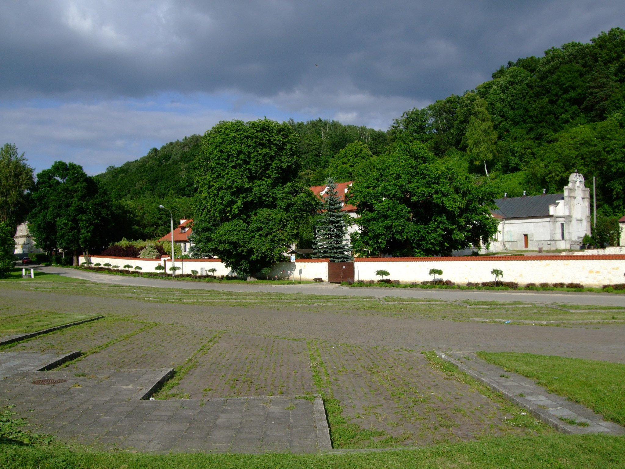 Klasztor Betanek w Kazimierzu Dolnym.